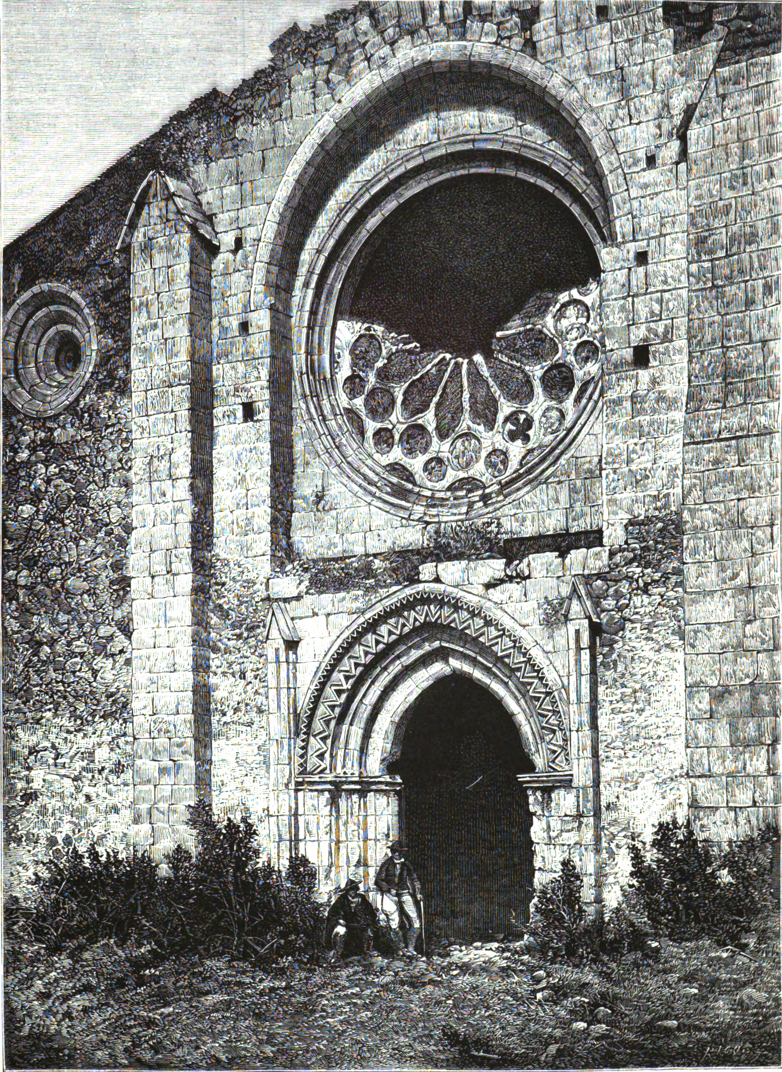 «Segovia.—Ermita de la Virgen de la Sierra» (monasterio de Santa María de la Sierra o de Sotosalbos).